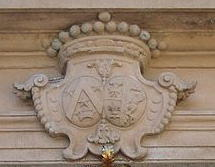 Åkeshovs slott i Bromma, Stockholm, detalj av sandstensportalen från 1723, Gabriel Stierncrona och hustrun Maria Amyas vapensköld.